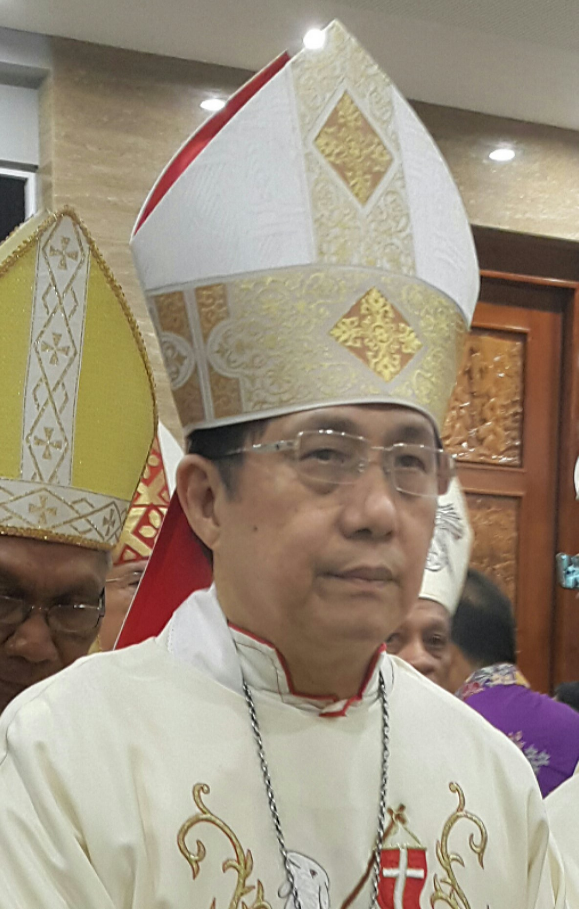 Mgr Henricus Pidyarto Gunawan, Uskup Malang